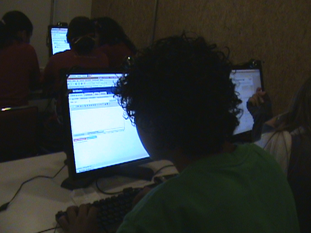 Foto de alumnos interactuando con recursos educativos disponibles en internet.